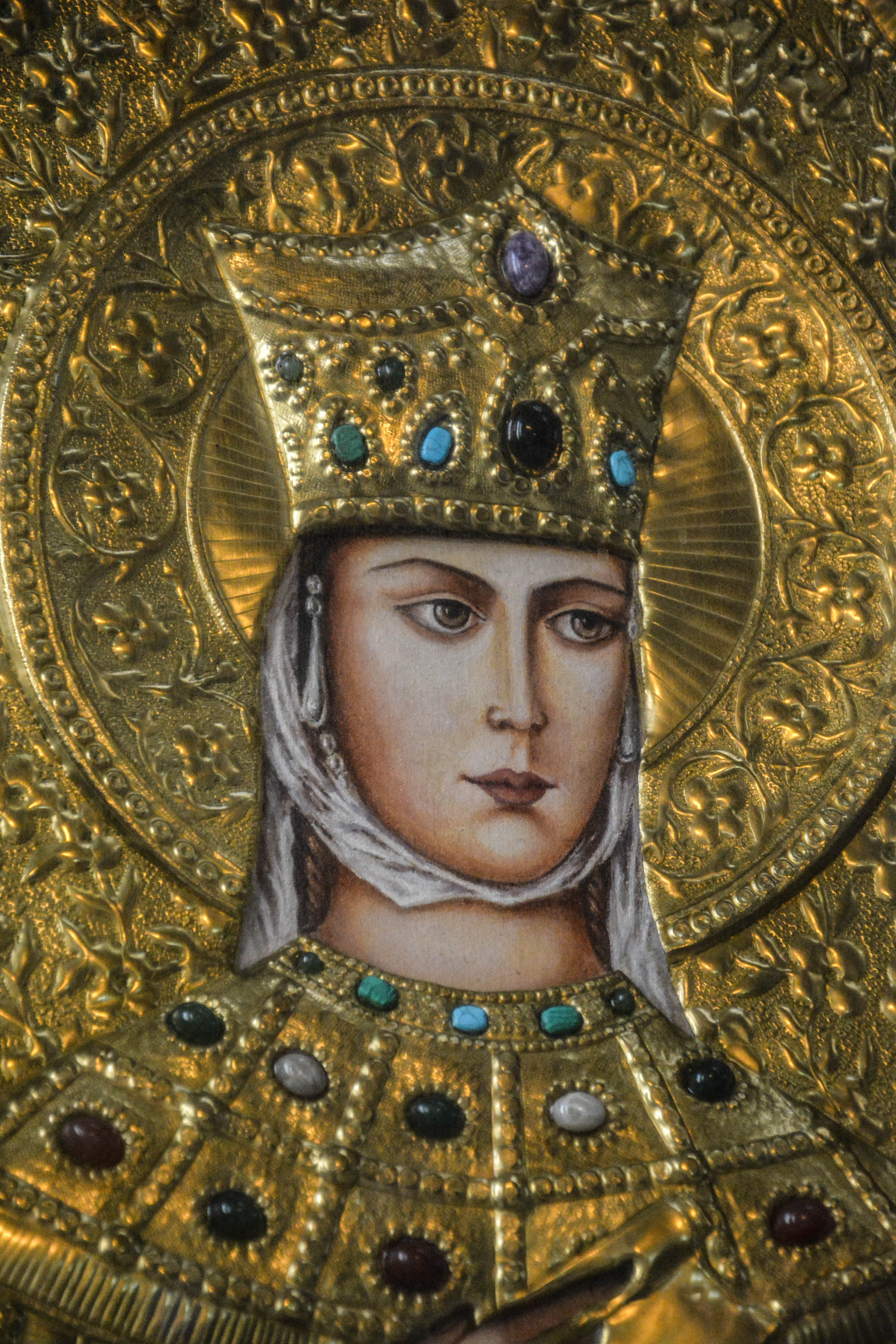 Georgia Tiflis Tbilisi